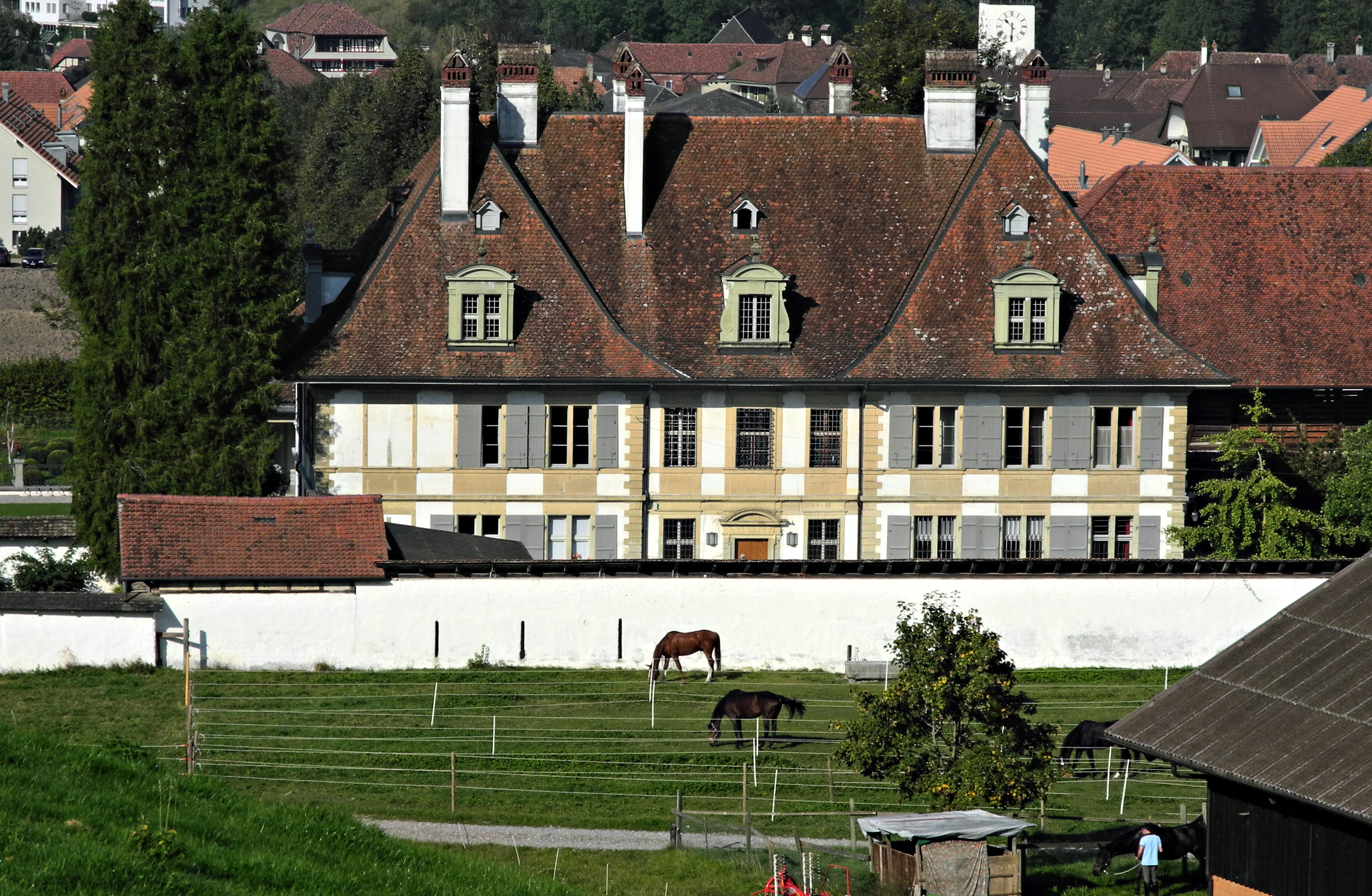 Oberdiessbach BE, Neues Schloss von oben (Rückseite)